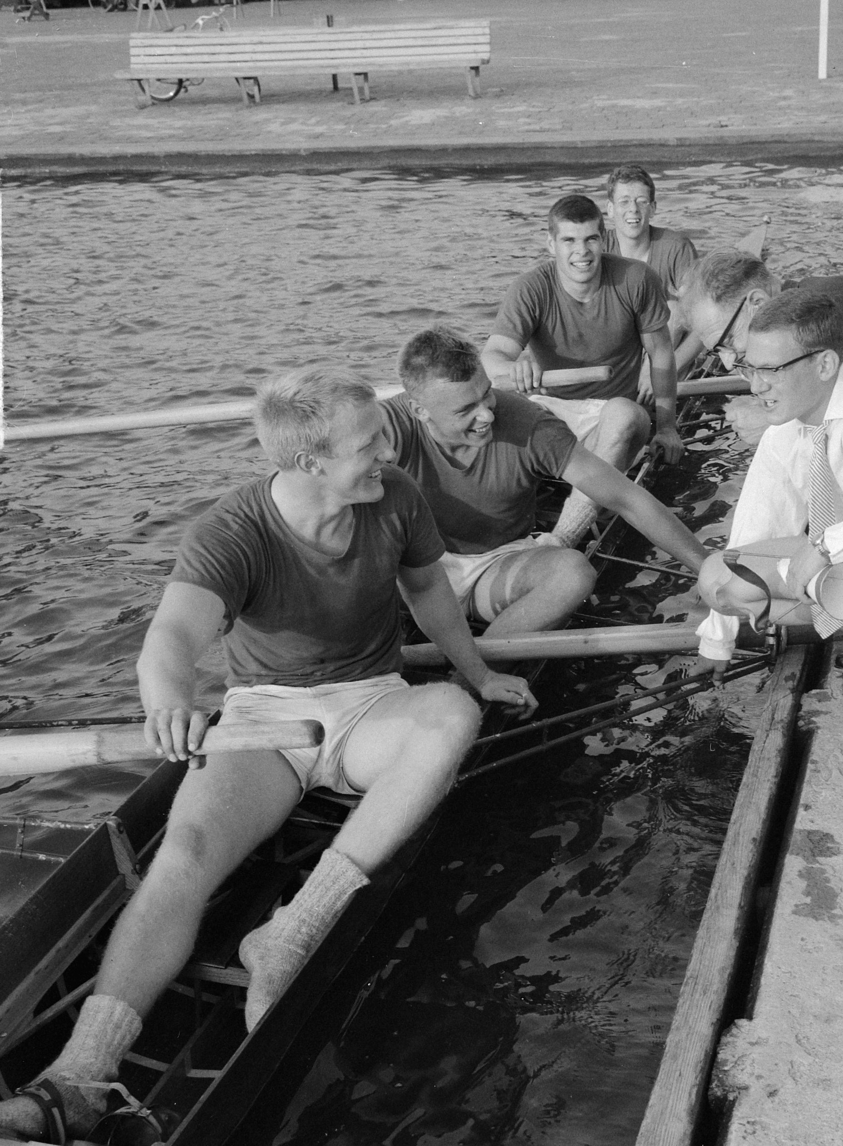 Nationale kampioenschappen roeien op de Bosbaan voor here vier met stuurman met de heren A. Mullink, J. van de Graaff , F. R. van de Graaff , R. van de